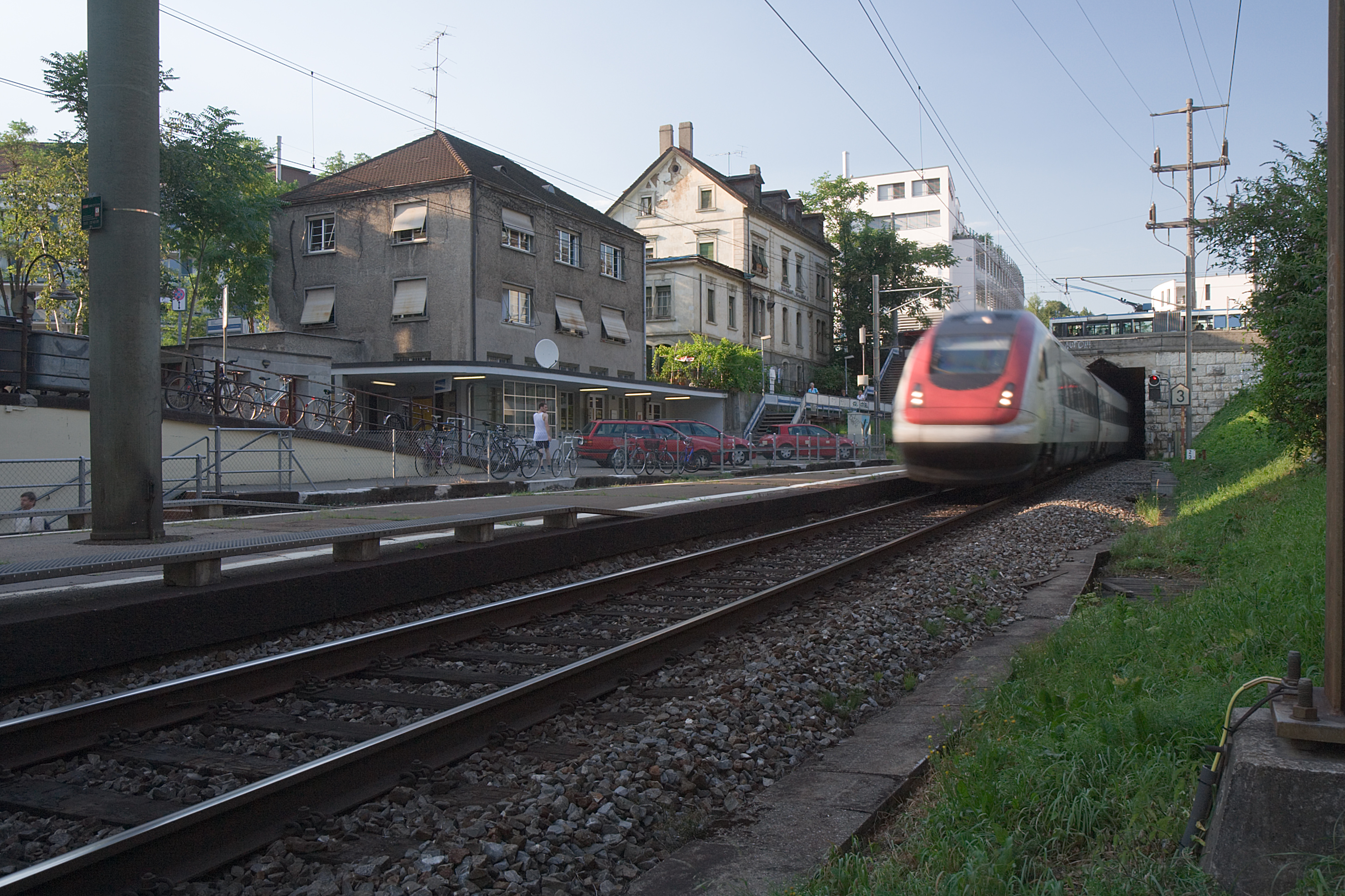 Der Bahnhof Wipkingen, das Restaurant Nordbrücke und die Nordbrücke in Zürich, Schweiz